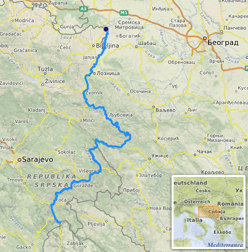 carte réalisée sur umap [1] This map may be incomplete, and may contain errors. Don't rely solely on it for navigation.